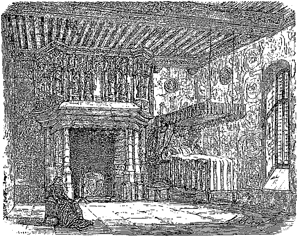 Gravure représentant une cheminée finement sculptée au château de Verdelle, à Poillé-sur-Vègre.